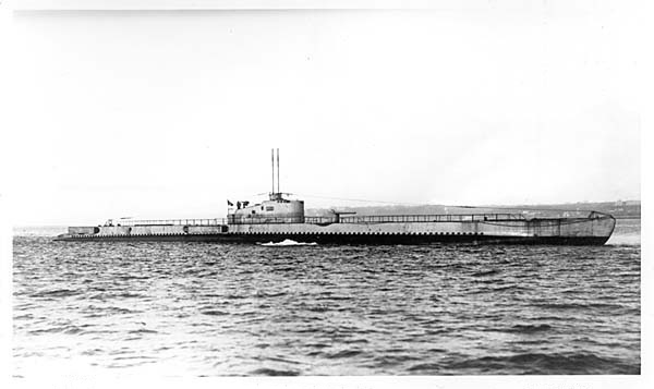 Sous marin français Ajax, de la classe Redoutable.